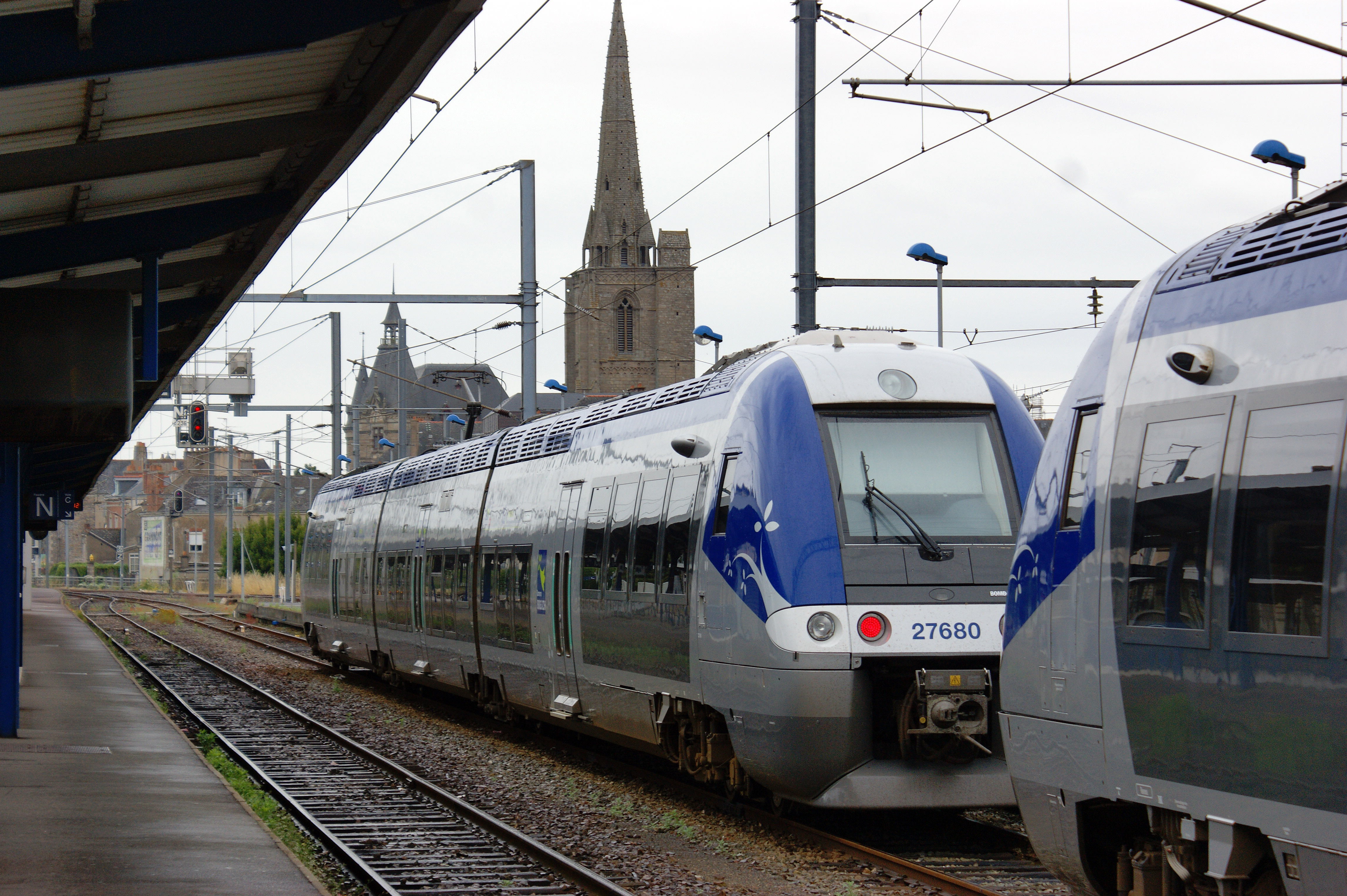 L'automotrice électrique Z 27500, des TER Bretagne, en gare de Redon.